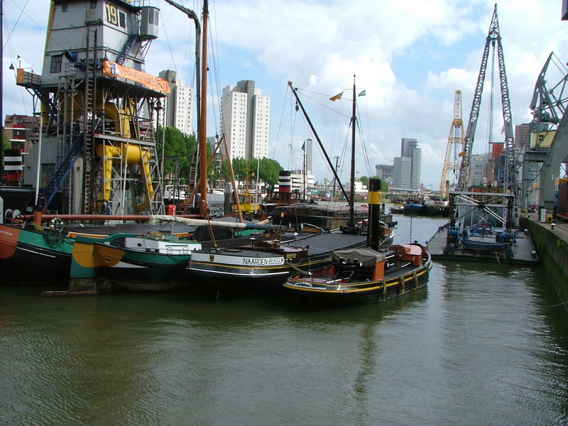 Stoomsleper MAASHAVEN met de collectie van het Havenmuseum in Rotterdam